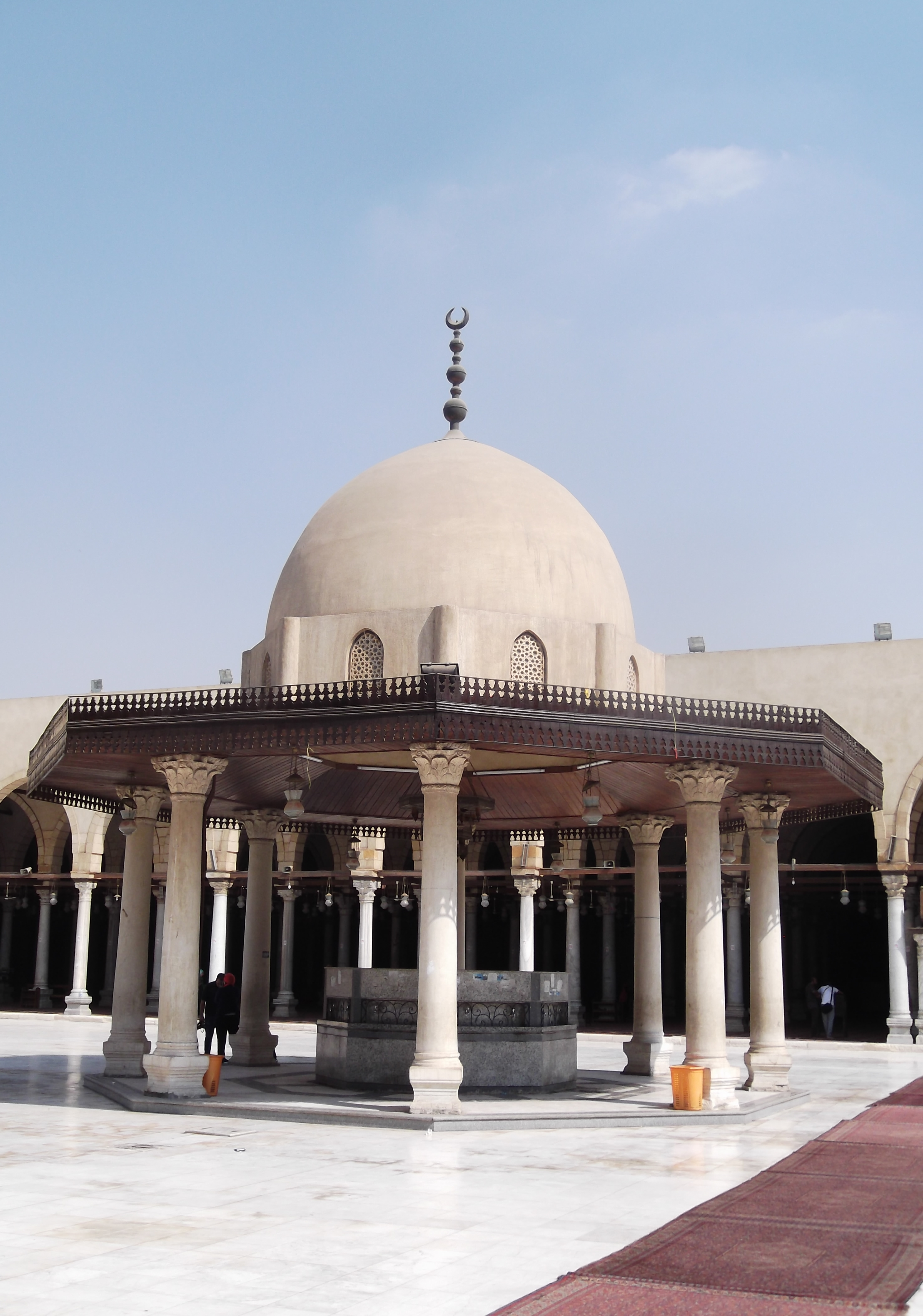 جامع عمرو بن العاص بالقاهرة.